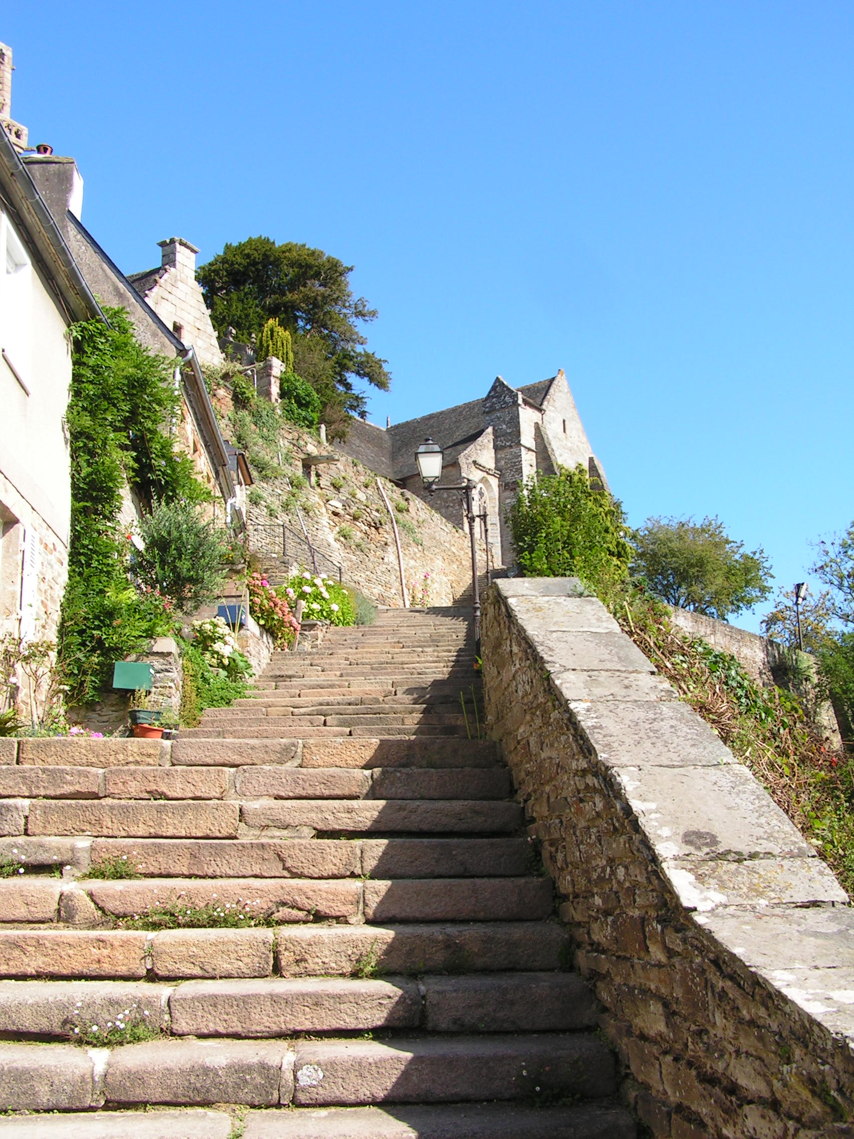 Église de la Trinité de Brélévenez à Lannion, vue depuis les marches de Brélévenez. .